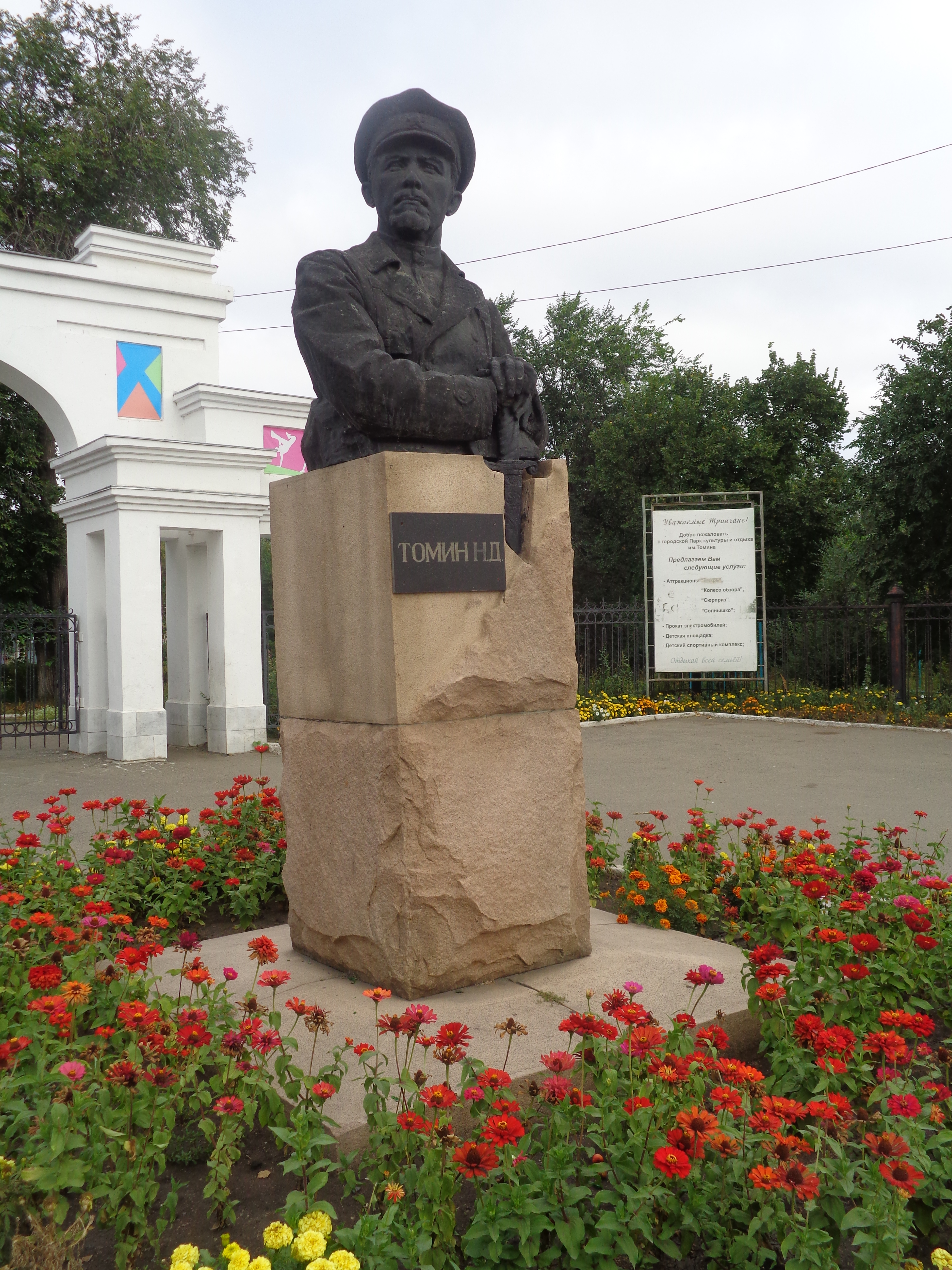 Памятник командиру троицкого отряда красной армии Н.Д. Томину: улица Советская, гпкио им.томина, Троицк, Челябинская область